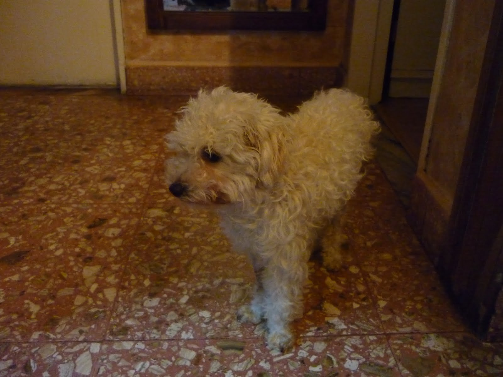 Amanda en recuperacion de Parvovirus